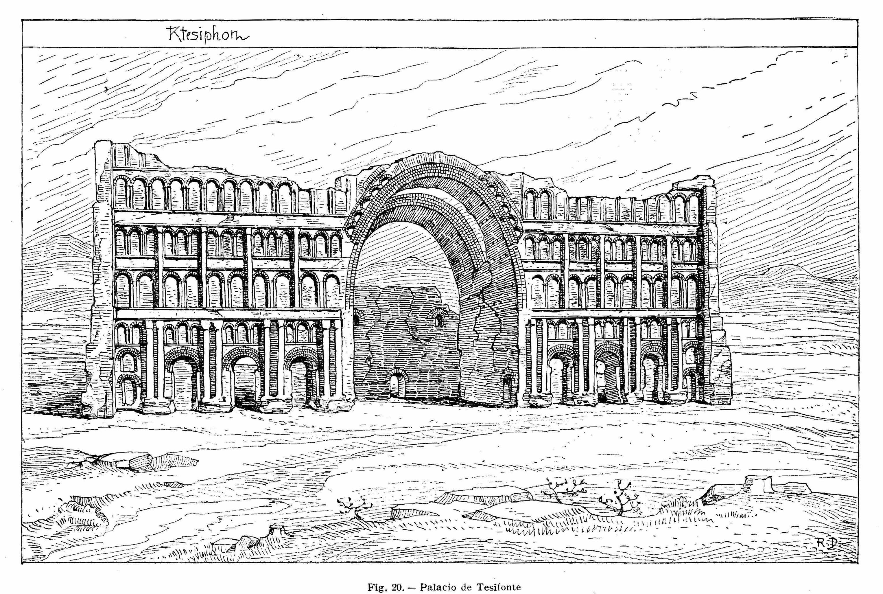 Palacio de Ctesifonte (Ctesiphon)(textos del dibujo en español)